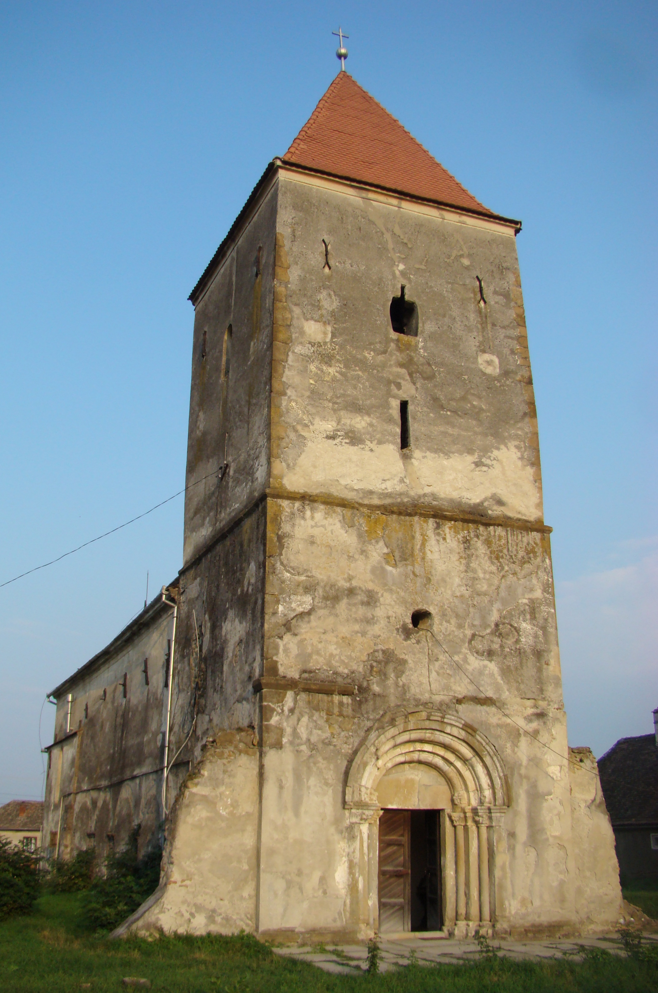 Biserica evanghelică maghiară din Săcădate, oraș Avrig